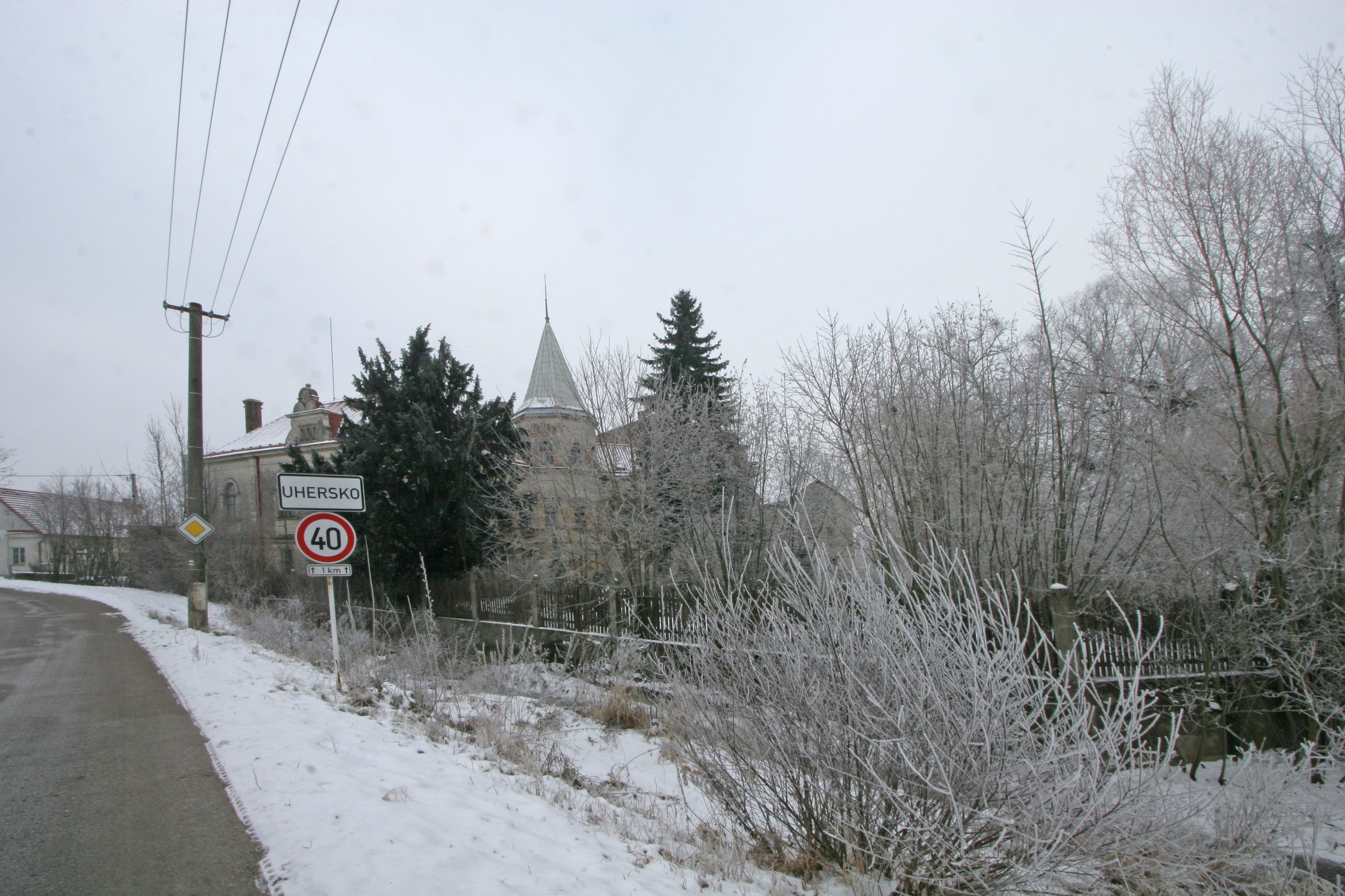 Uhersko čp. 44